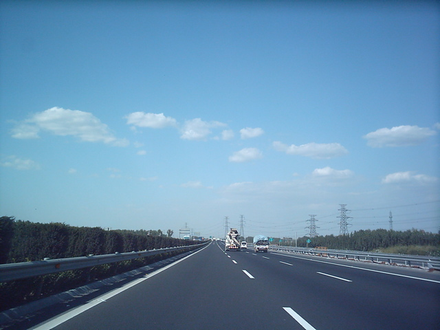 高速公路 (北京五环路) (DF08 (中文) 2004年图片)